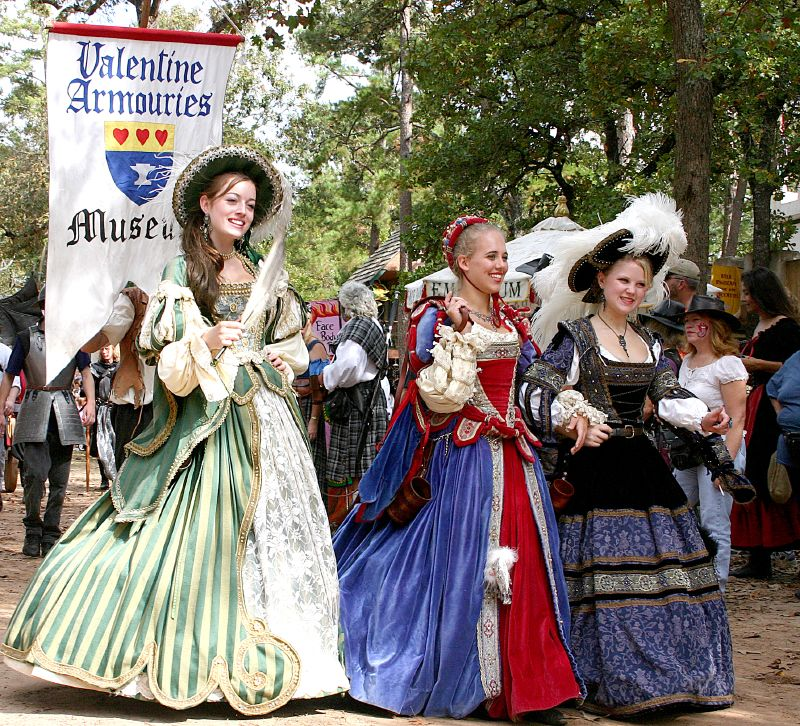 Maidens